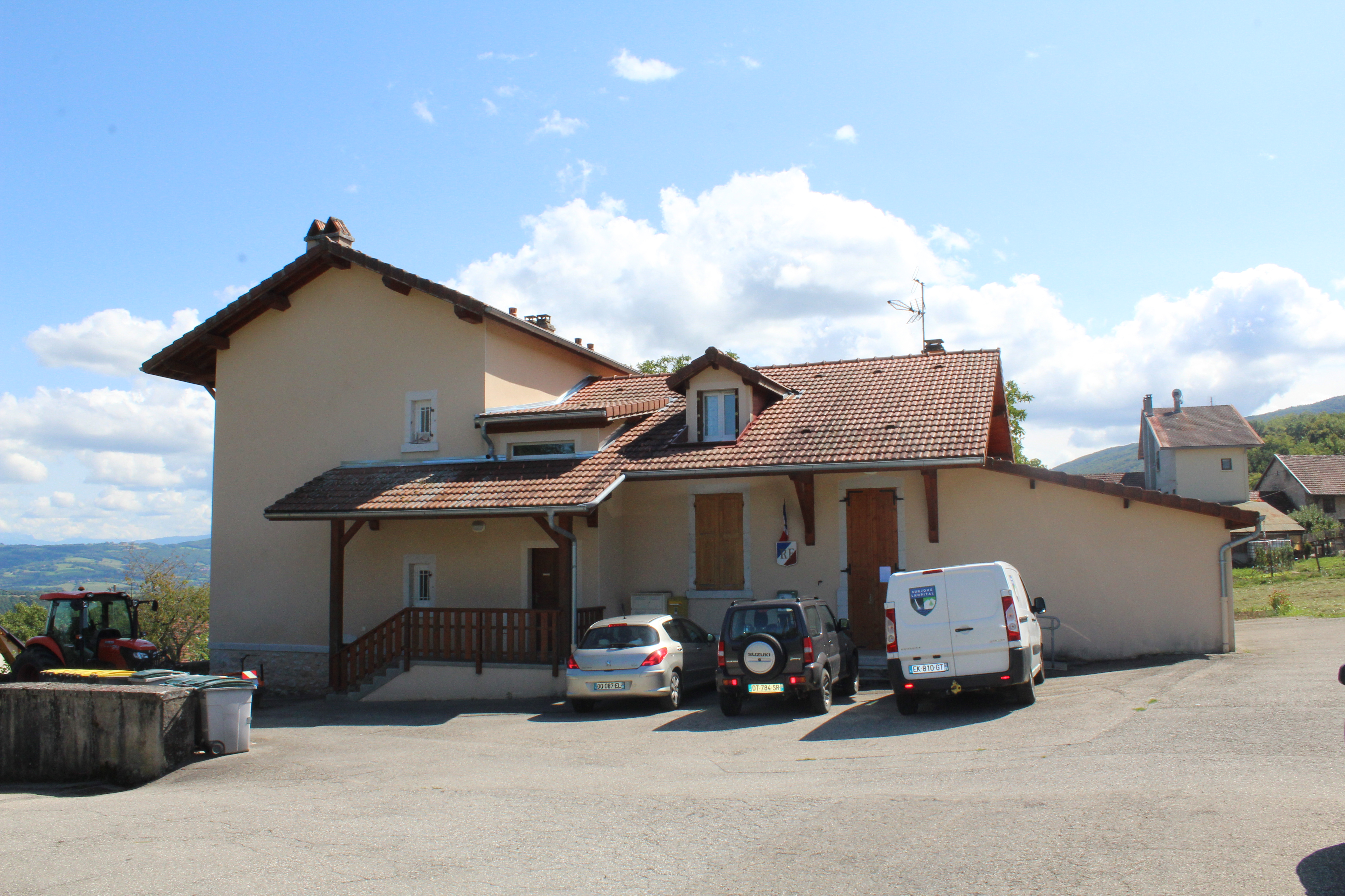 Mairie de Lhôpital.